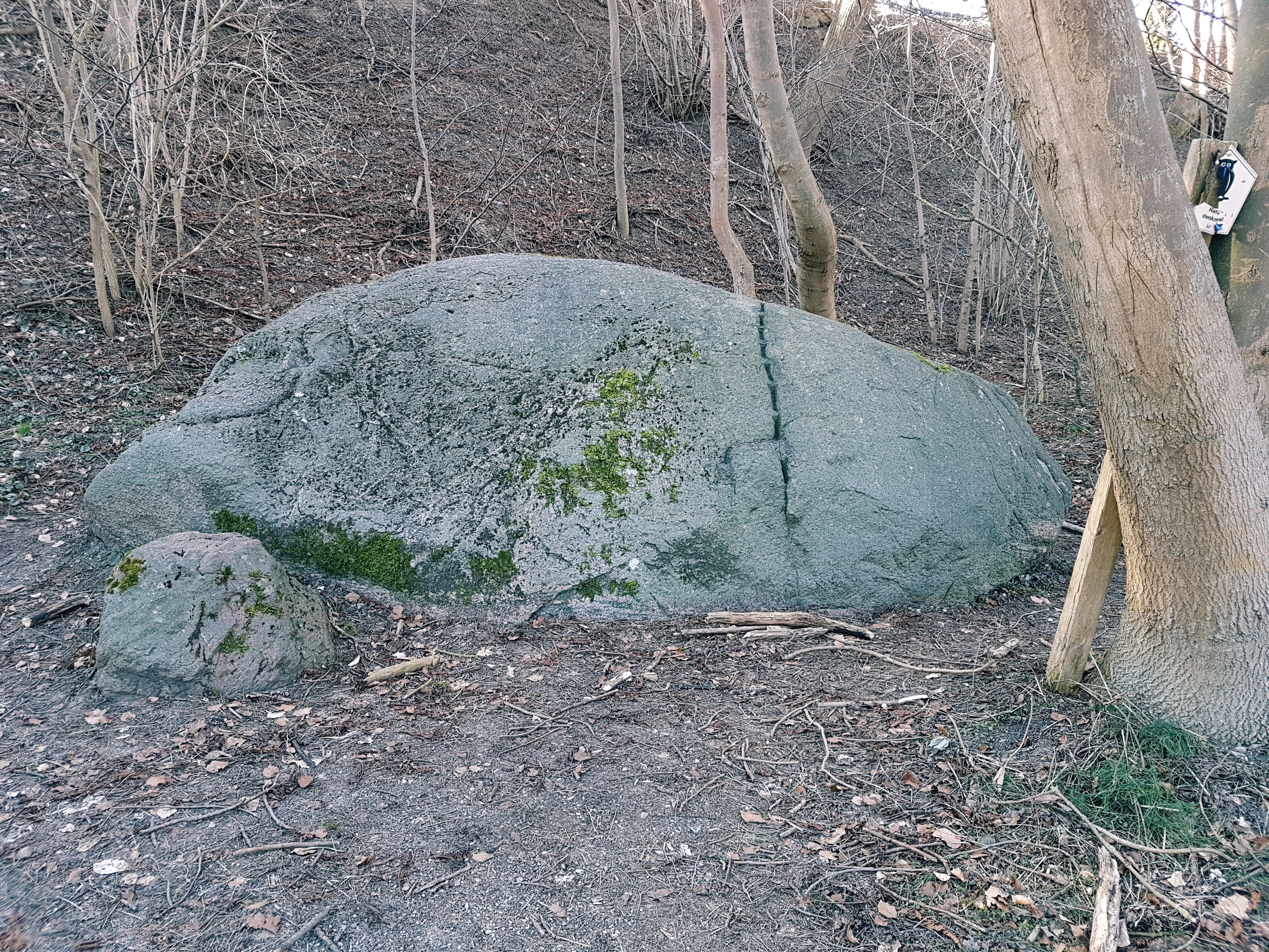 Der Riesenstein in Klink. Der kleinere Stein im Vordergrund ist ein anderes Material und gehört nicht zum Findling.